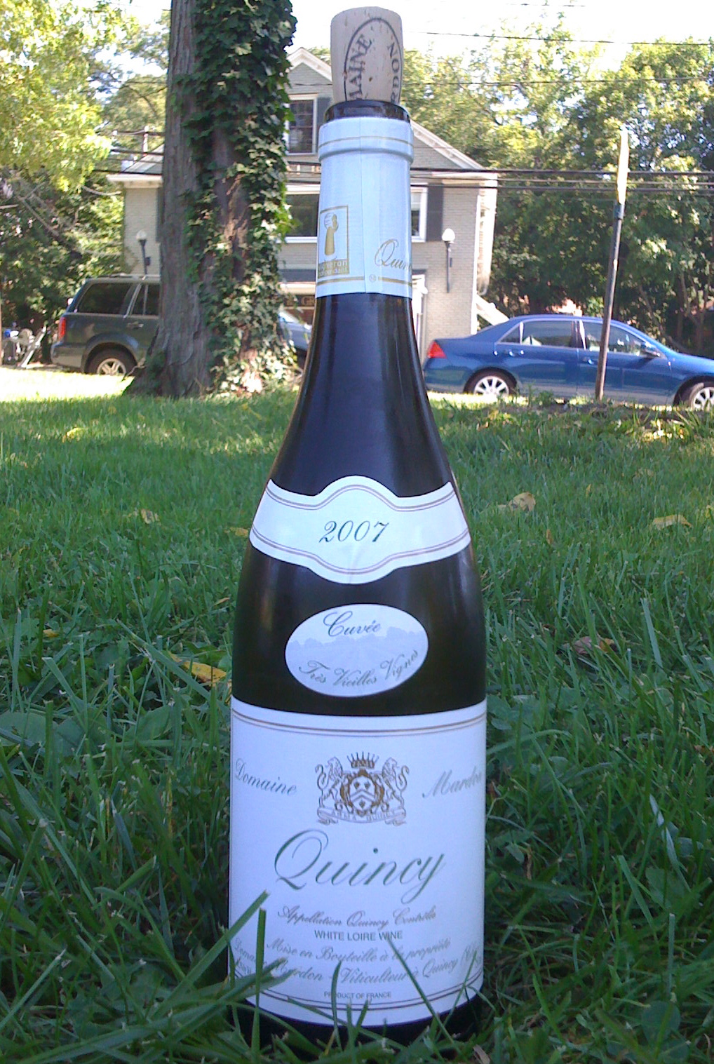 AOC Quincy Domaine Mardon sauvignon 2007